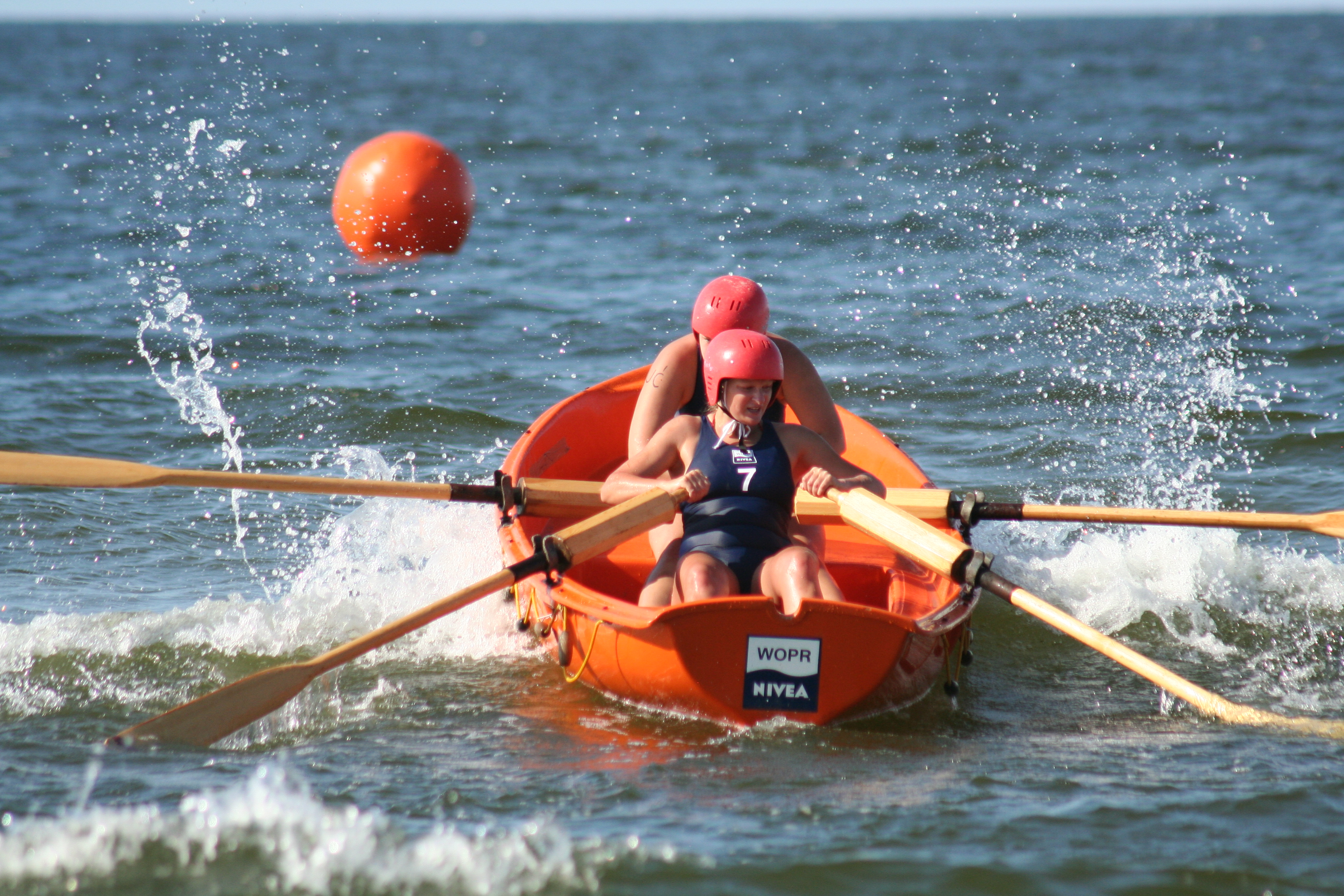 Mistrzostwa WOPR